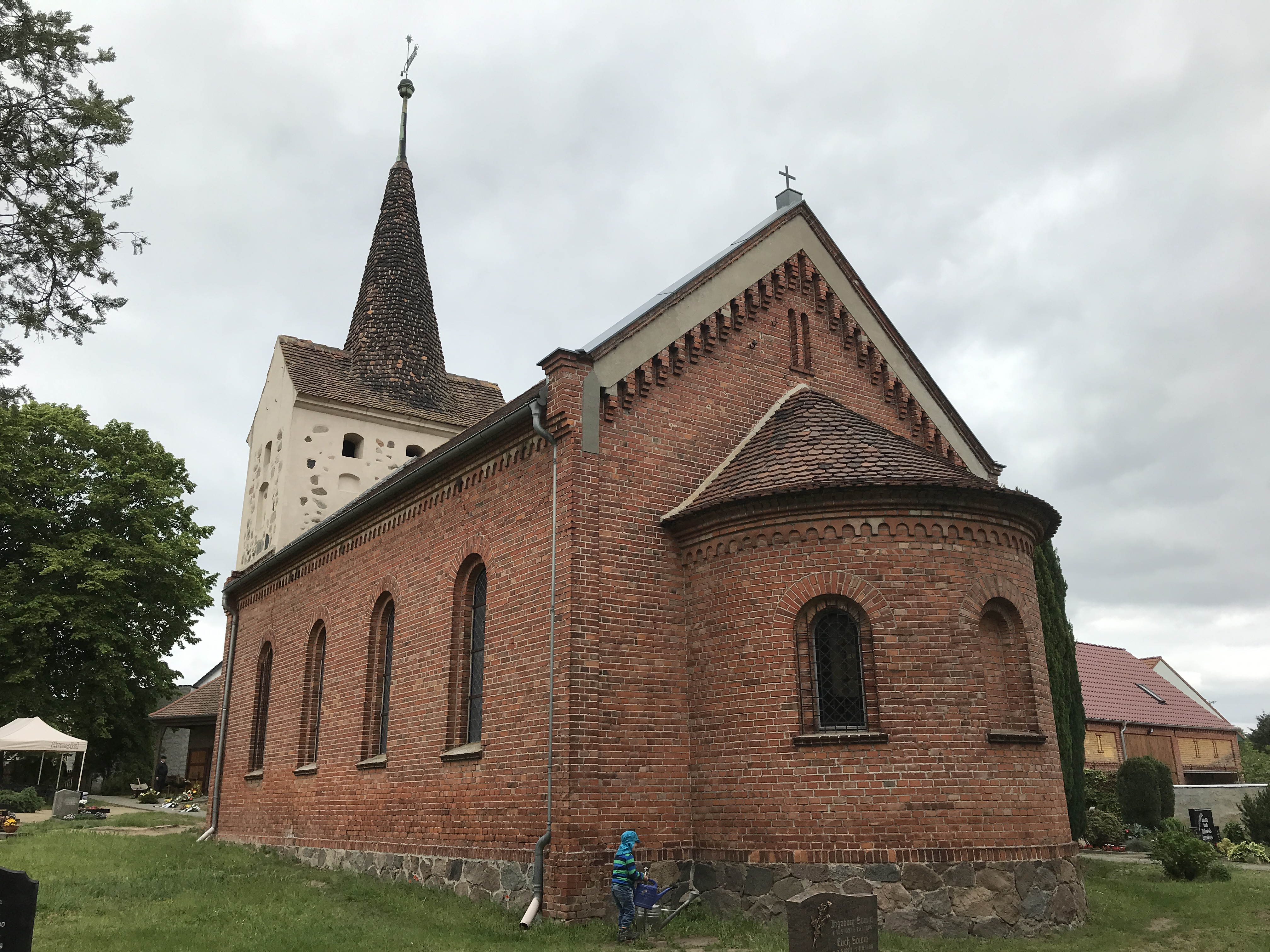 Die Dorfkirche Göttin im gleichnamigen Ortsteil der Stadt Brandenburg an der Havel im Land Brandenburg ist eine Saalkirche aus dem Jahr 1870. Im Innern steht unter anderem ein Altarretabel mit einem Gemälde der Grablegung Christi.